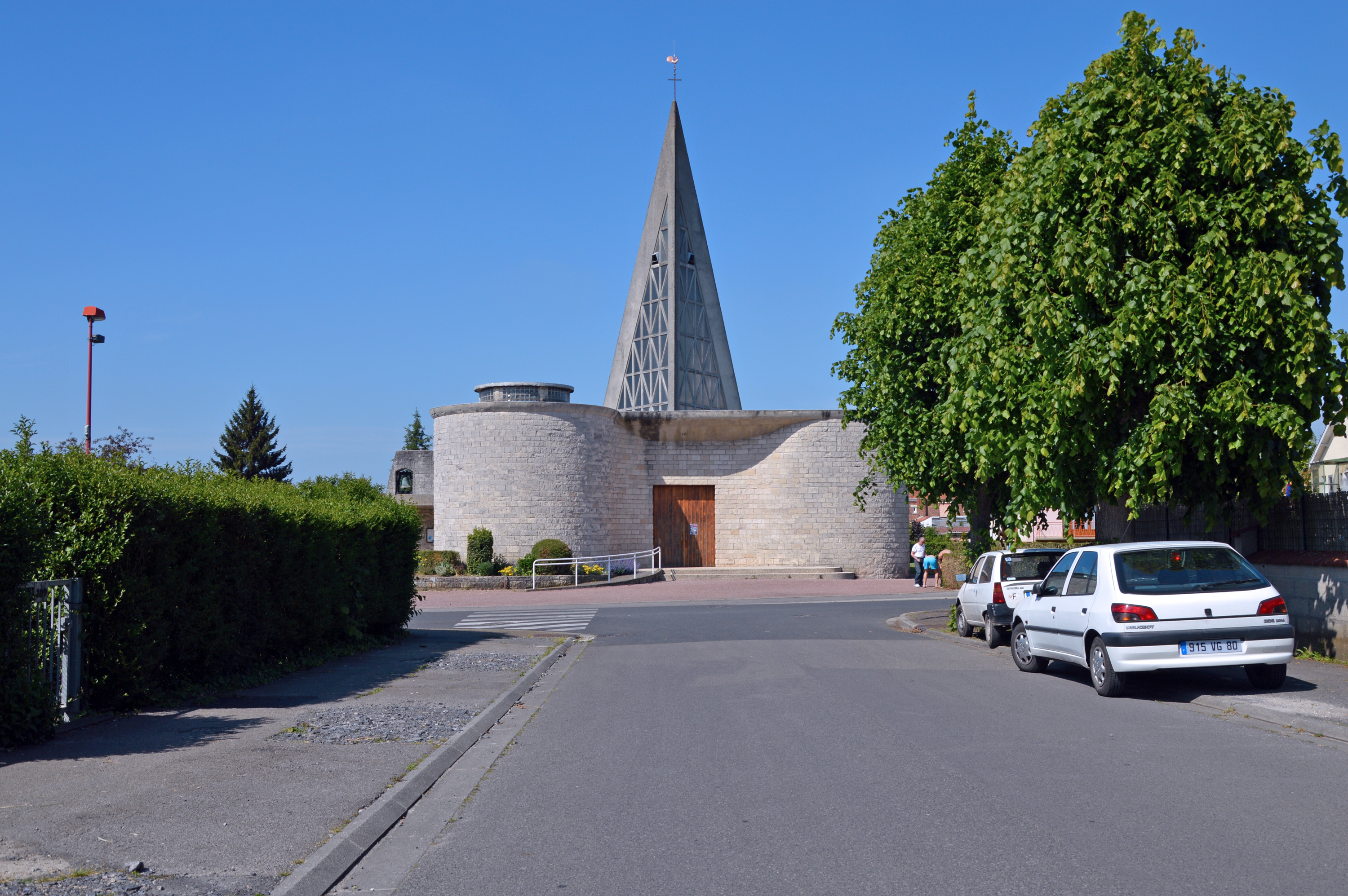 Eglise paroissiale Saint-Médard